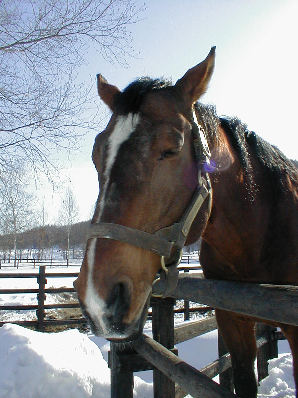 十勝種馬場にて。